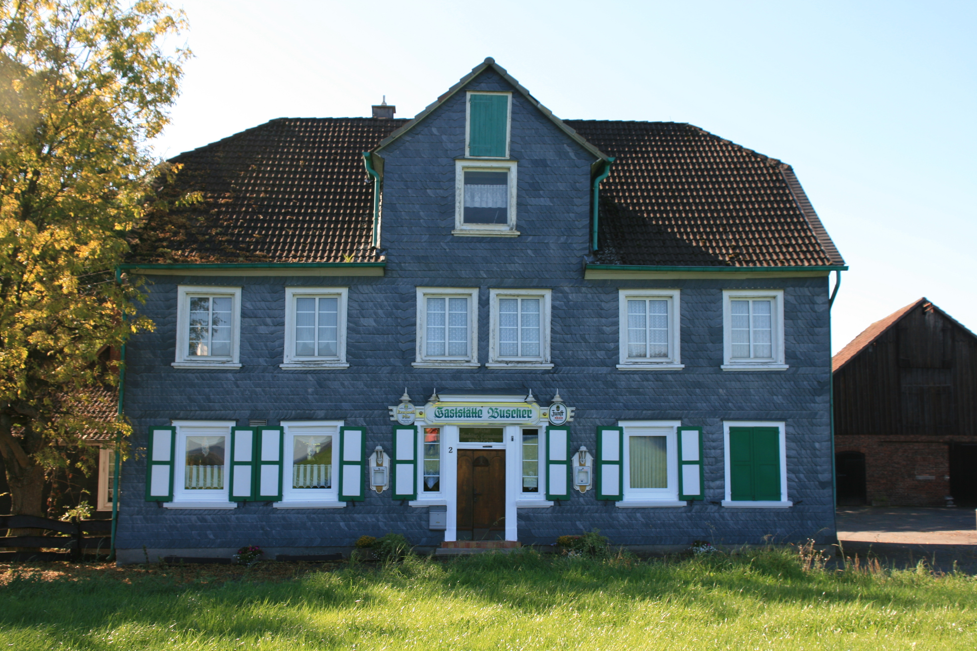 Gaststätte Buscher, vormals "Wirtschaft, Manufaktur & Colonialwaren Willhelm Paffrath, Neuenholte 2 in Hückeswagen-Neuenholte